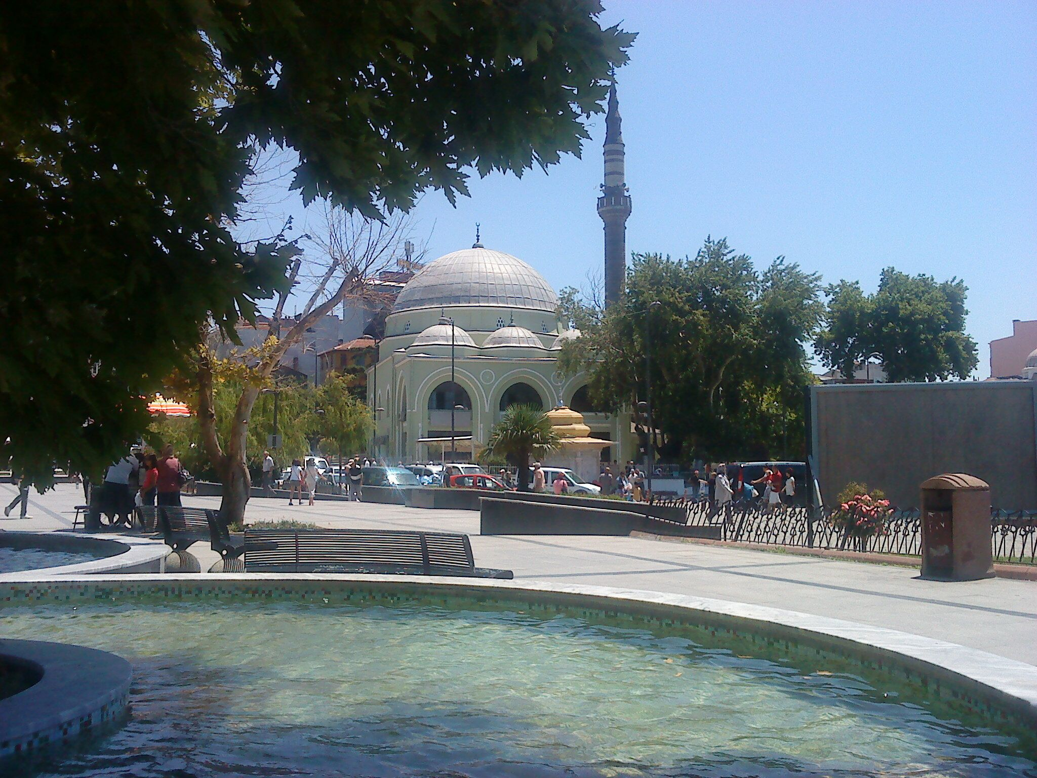 Bandırma Haydarçavuş camii